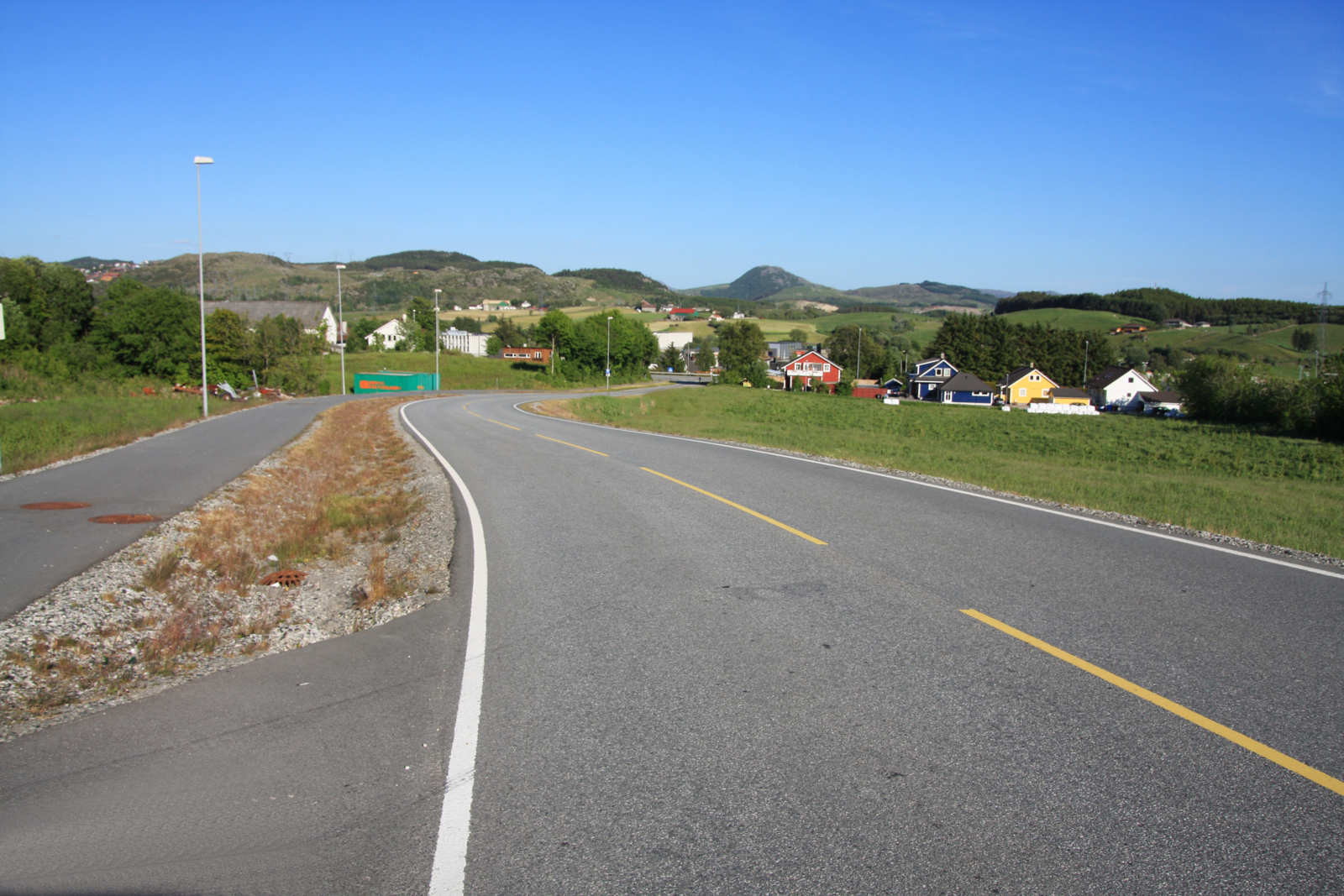 Fylkesvei 320 Leiteveien mot Jærveien